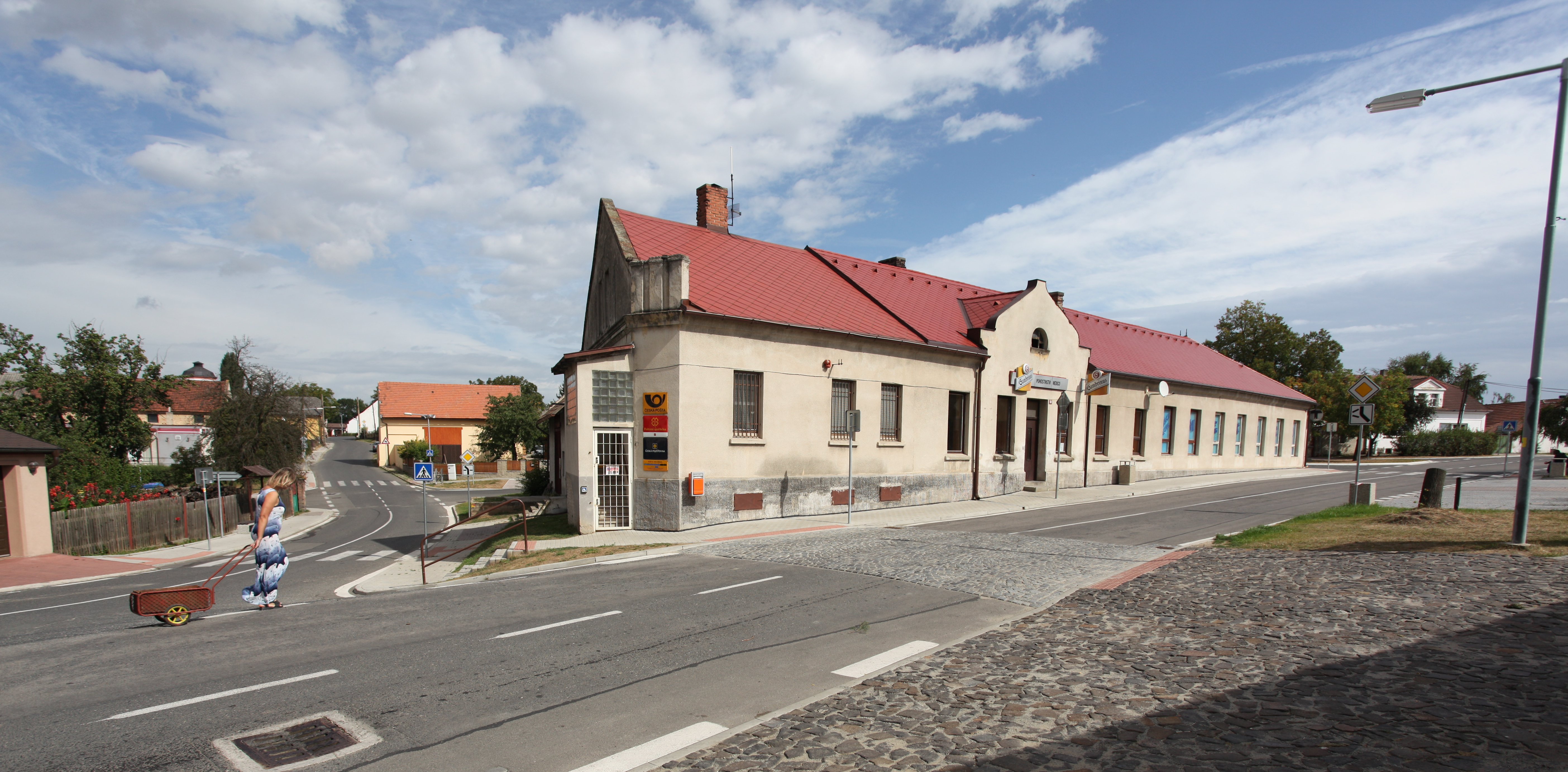 Česky: Mečeříž, pošta/hospoda